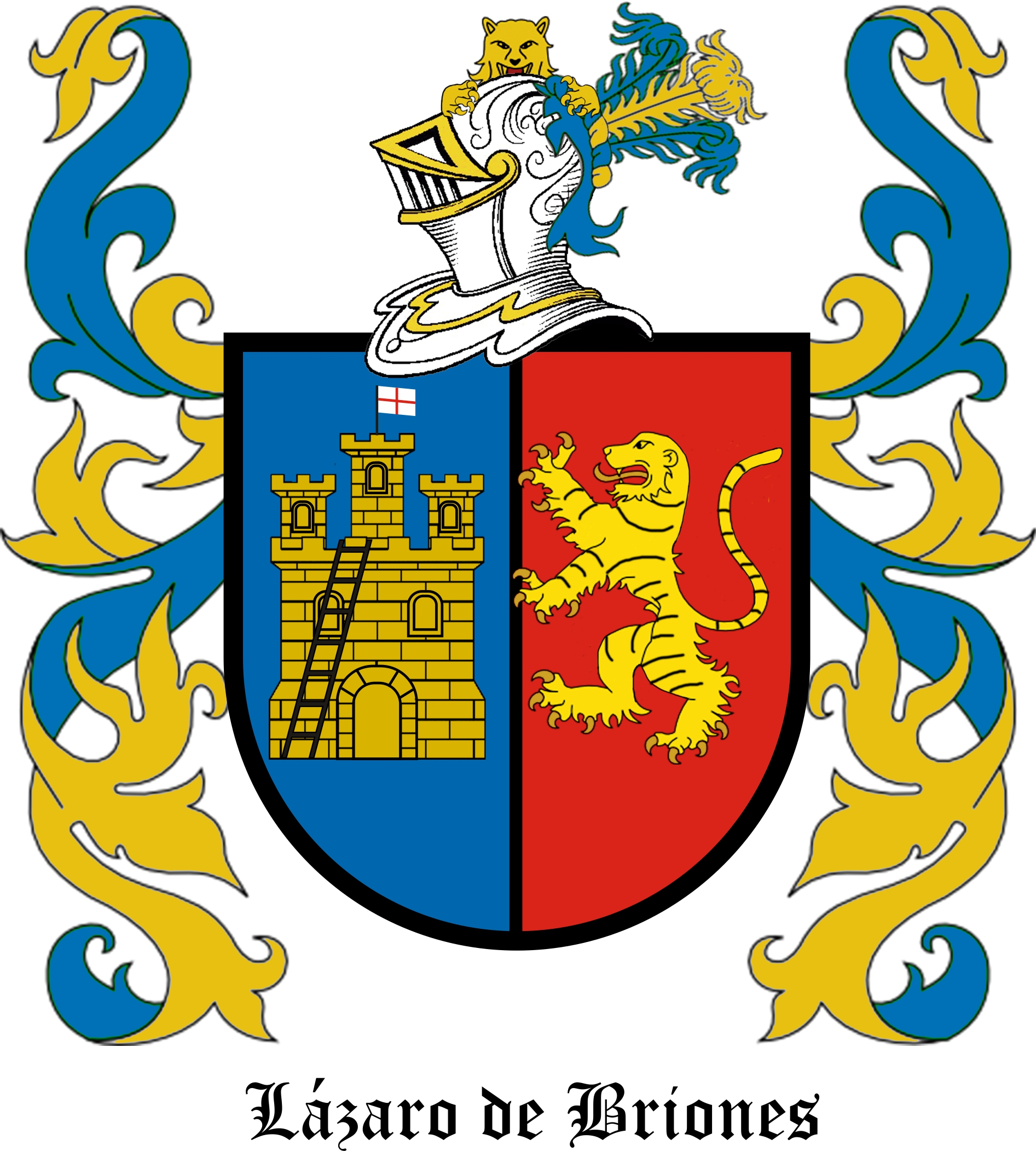 Escudo de Armas de don Lázaro de Briones, otorgado por Felipe II, mediante real cédula, dada en Toledo, el 10 mayo 1560.